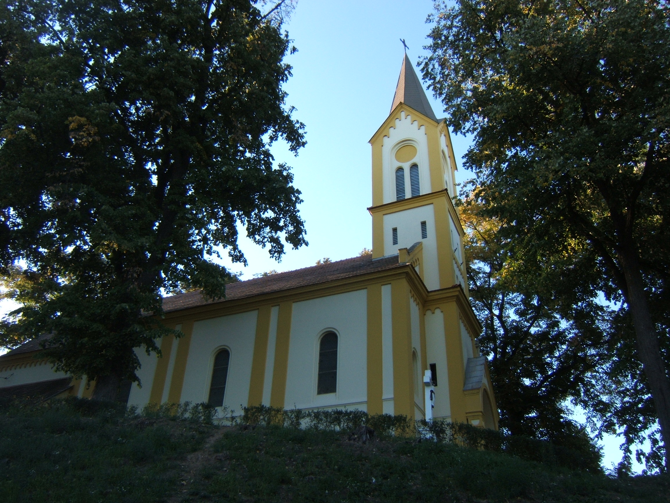 Kercseliget, templom